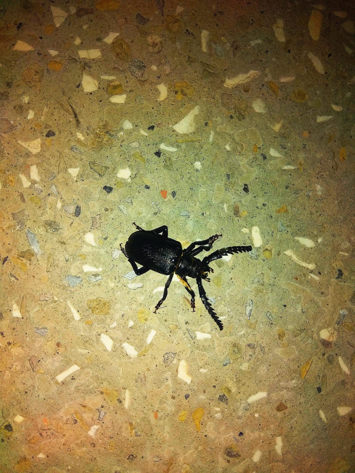 Prionus coriarius found in Burzenin, Poland